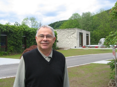 Jean-Pierre Ramis, mathématicien français, à Oberwolfach en 2008